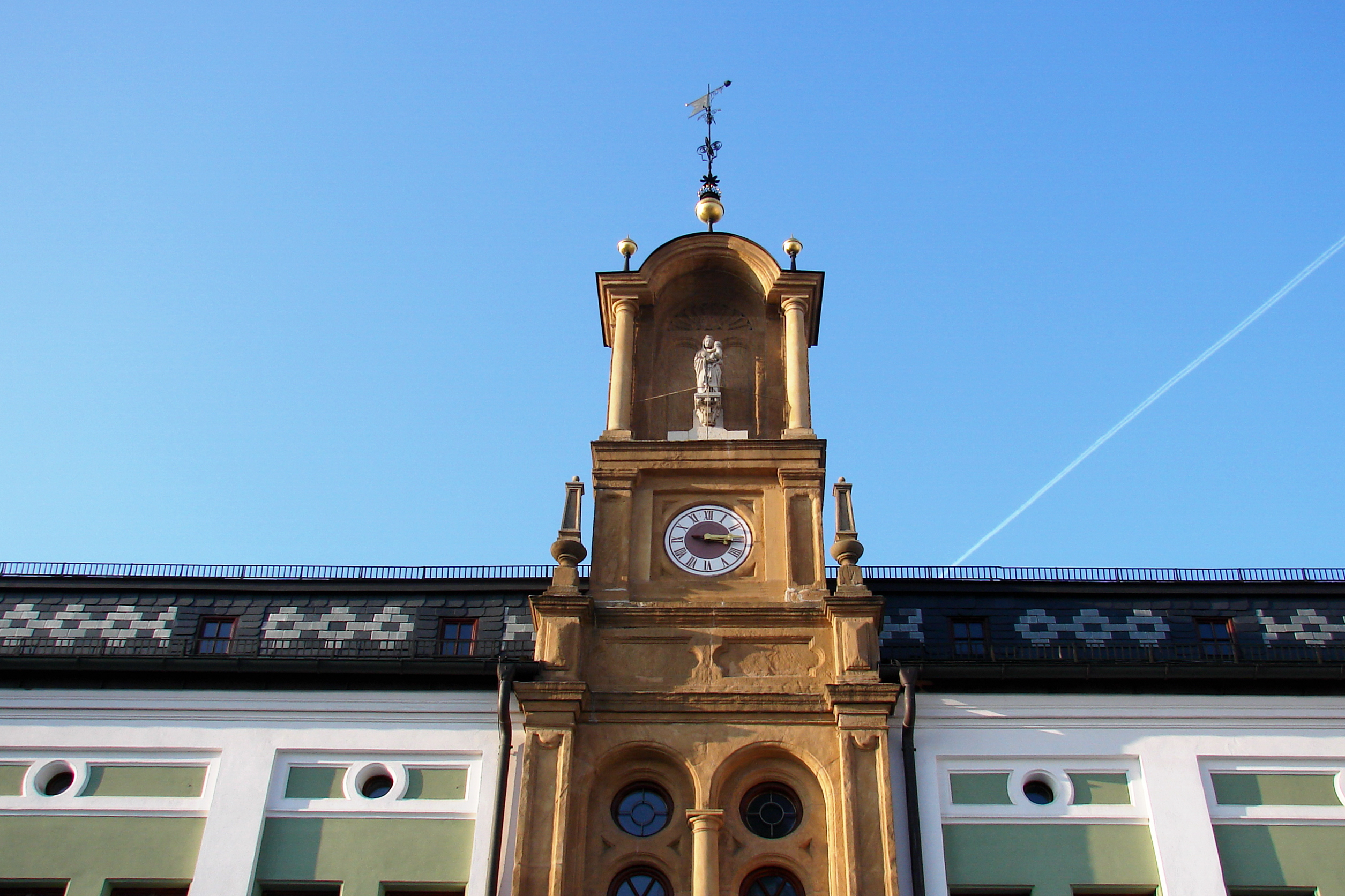 Wolnzacher Rathaus am Marktplatz